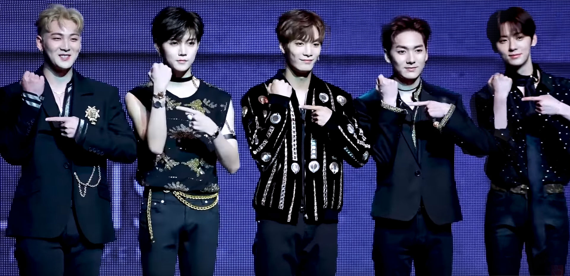 그룹 ‘뉴이스트’ 미니 6집 ‘해필리 에버 애프터(Happyily Ever After)’ 쇼케이스가 29일 오후 서울 용산구 한남동 블루스퀘어 아이마켓홀에서 열렸다.